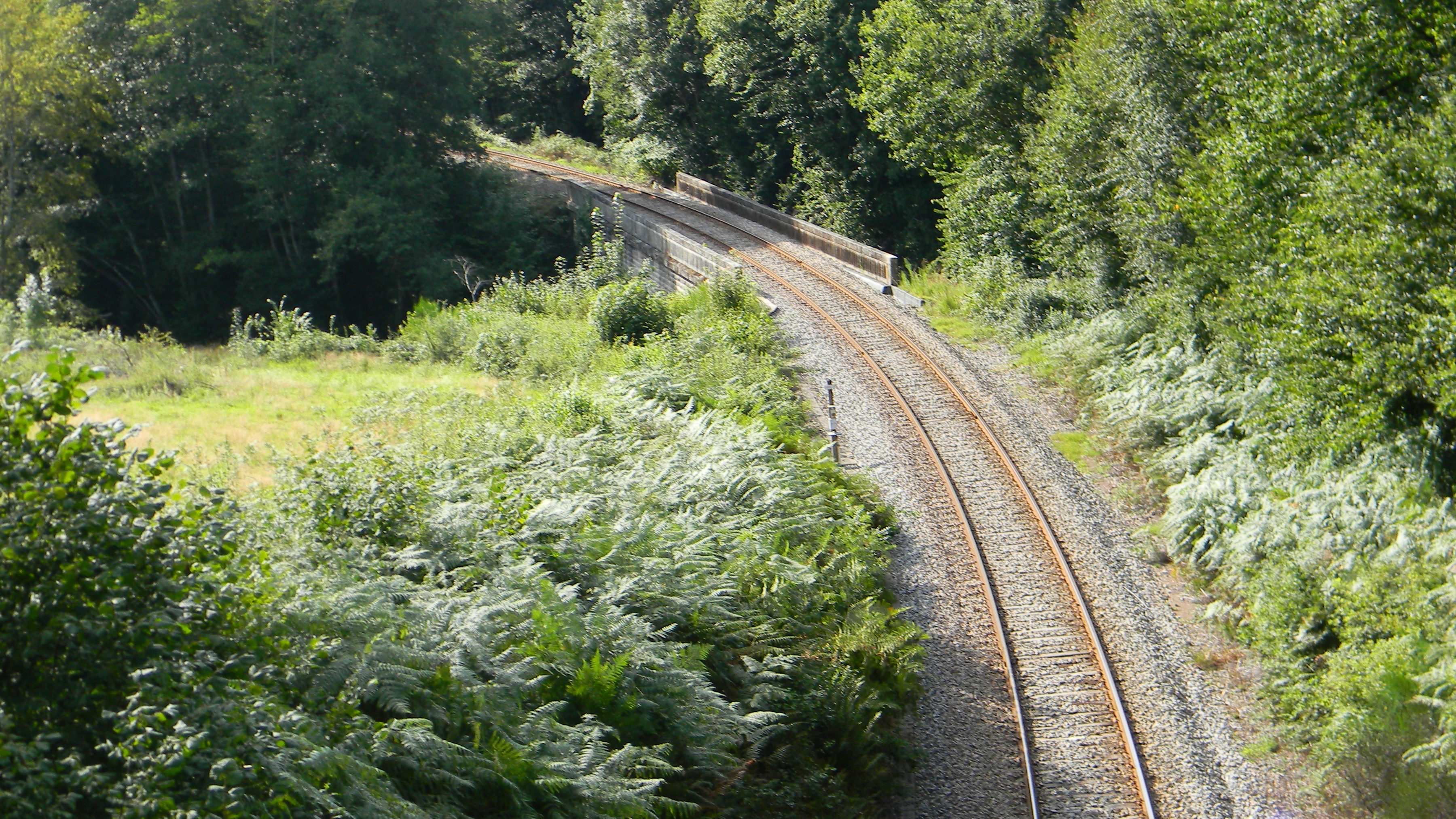 Le premier pont ferroviaire sur la Vienne aux Trois Pont, pris du pont routier sur la voie ferrée